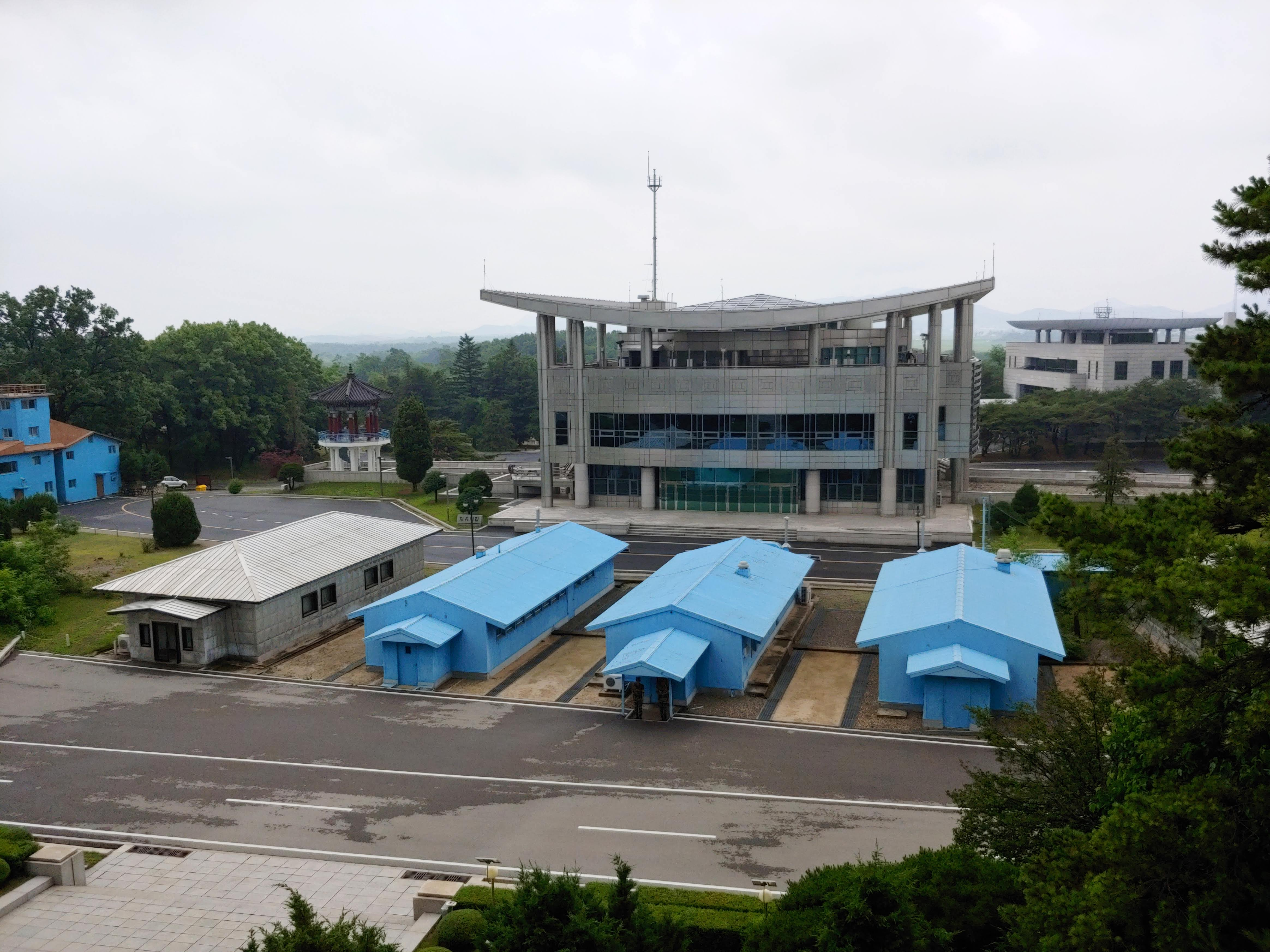 Vu sur les iconiques bâtiment bleu à la Zone coréenne démilitarisée